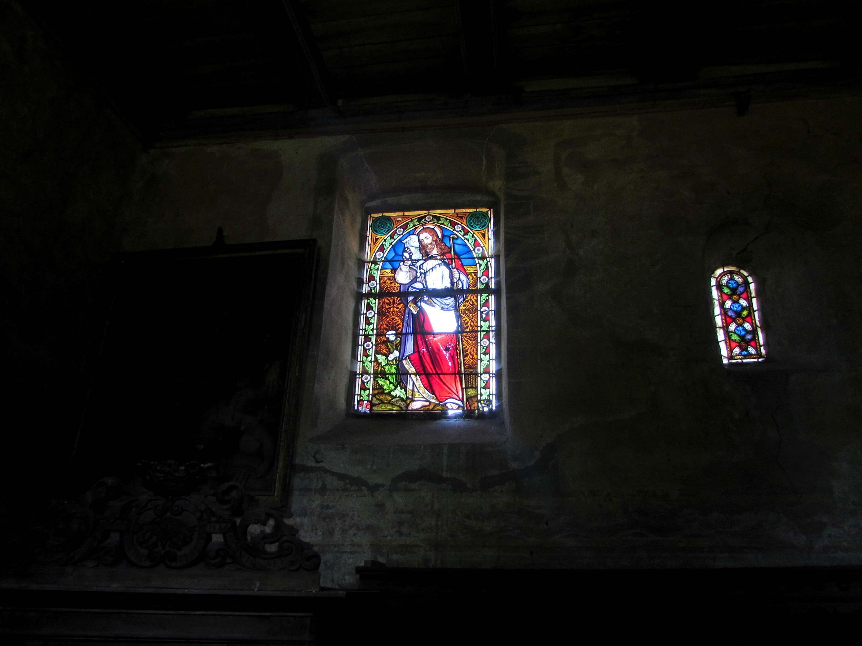 kirchenfenster dorfkirche warchau